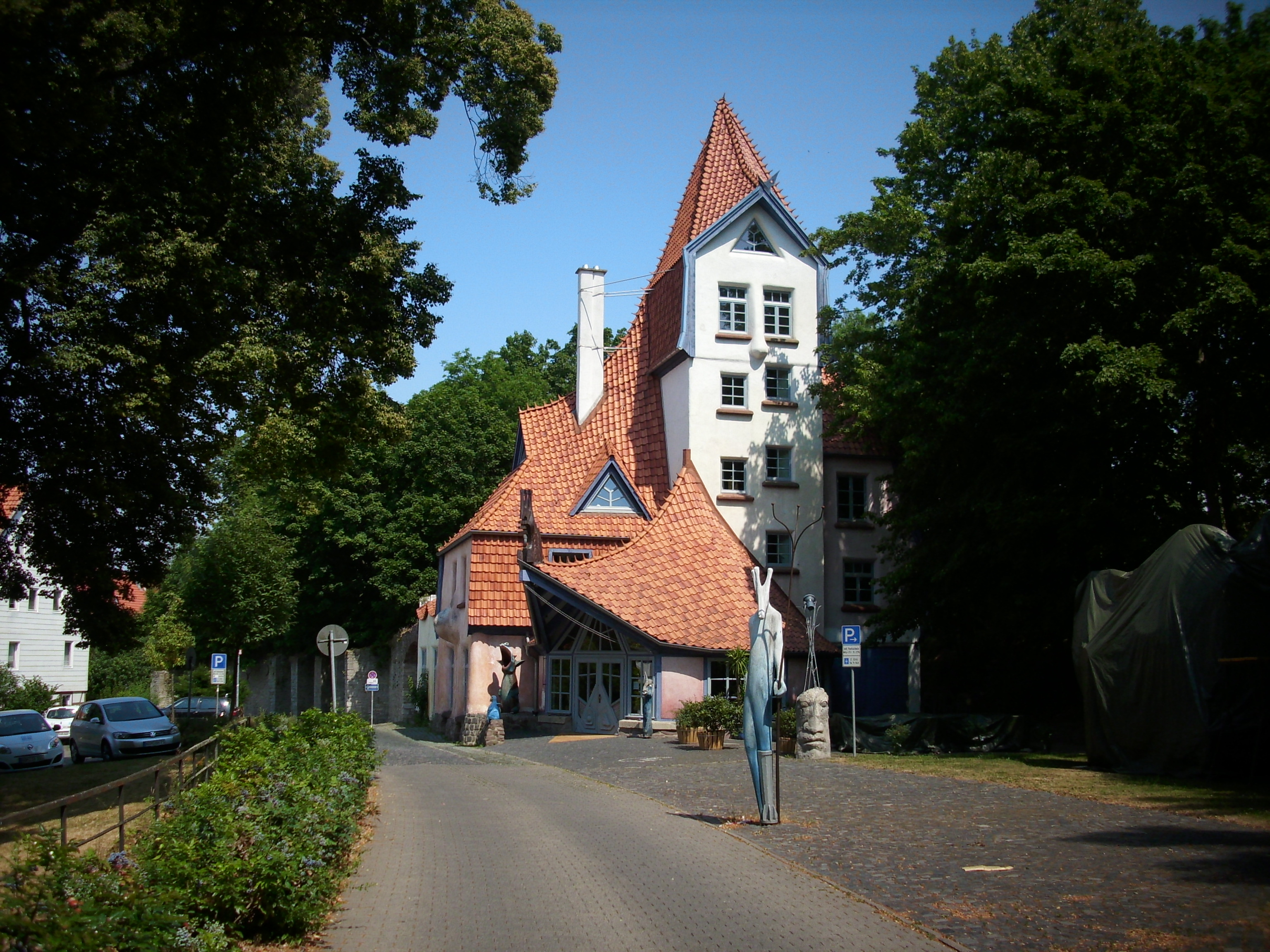 Das Theater der Nacht in Northeim, ein weit über die Grenzen Northeims hinaus bekanntes Puppentheater. Ursprünglich eine Feuerwehrgerätehaus.